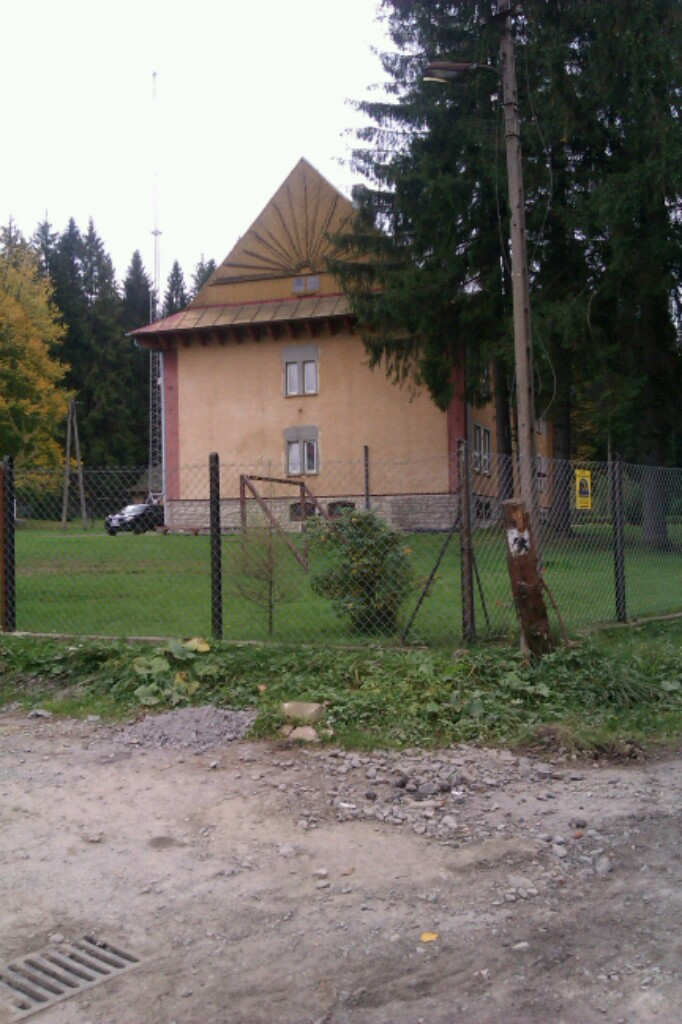 Soblówka, Szkolne Schronisko Młodzieżowe. Budynek po byłej Strażnicy Wojsk Ochrony Pogranicza Soblówka (WOP), od 16 maja 1991 roku Strażnica Straży Granicznej w Soblówce do 2005 roku.